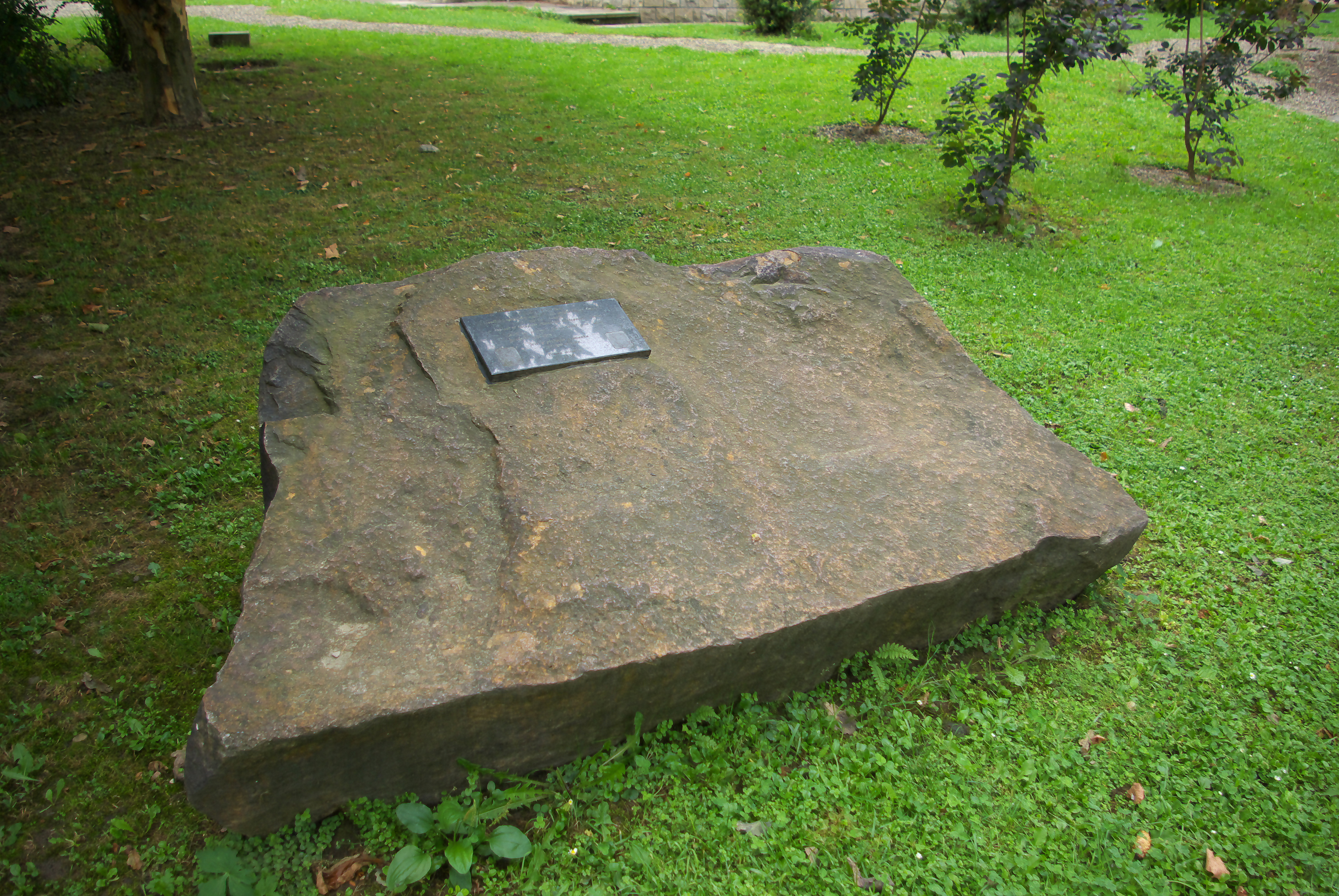 Kamień upamiętniający pierwszą wzmiankę o Sanoku z 1150 roku oraz otrzymanie praw miejskich w 1339 roku